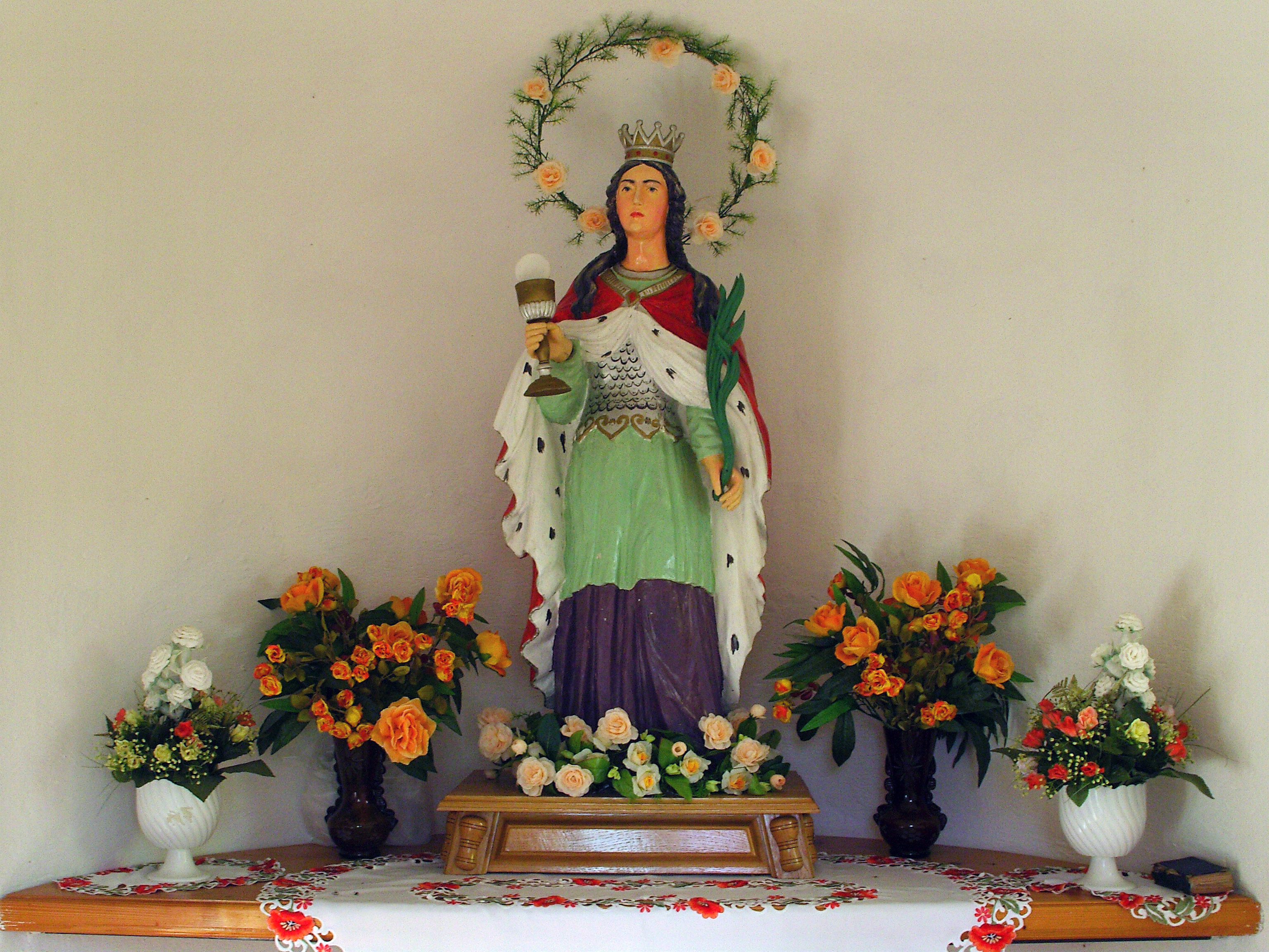 Wnętrze kapliczki św. Barbary - naprzeciw kościoła parafialnego Imienia Maryi w Bączalu Dolnym